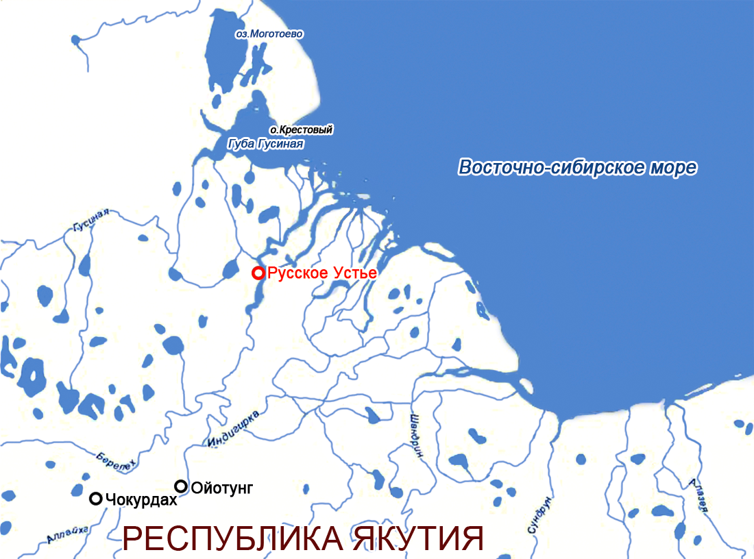 Карта низовьев Индигирки